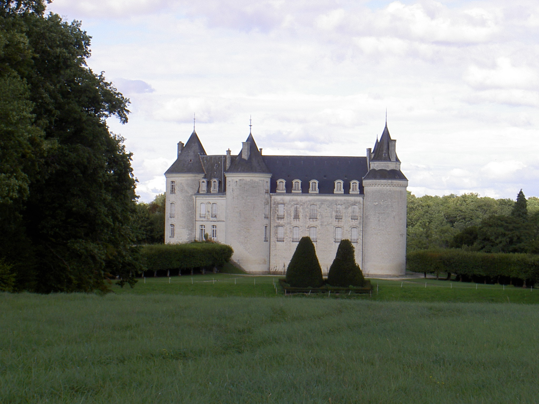 PA00097635